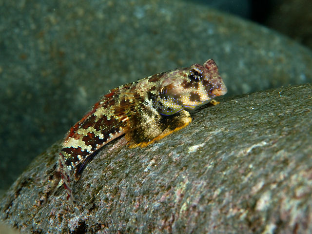 コウワンテグリ Nosynchiropus ocellatus